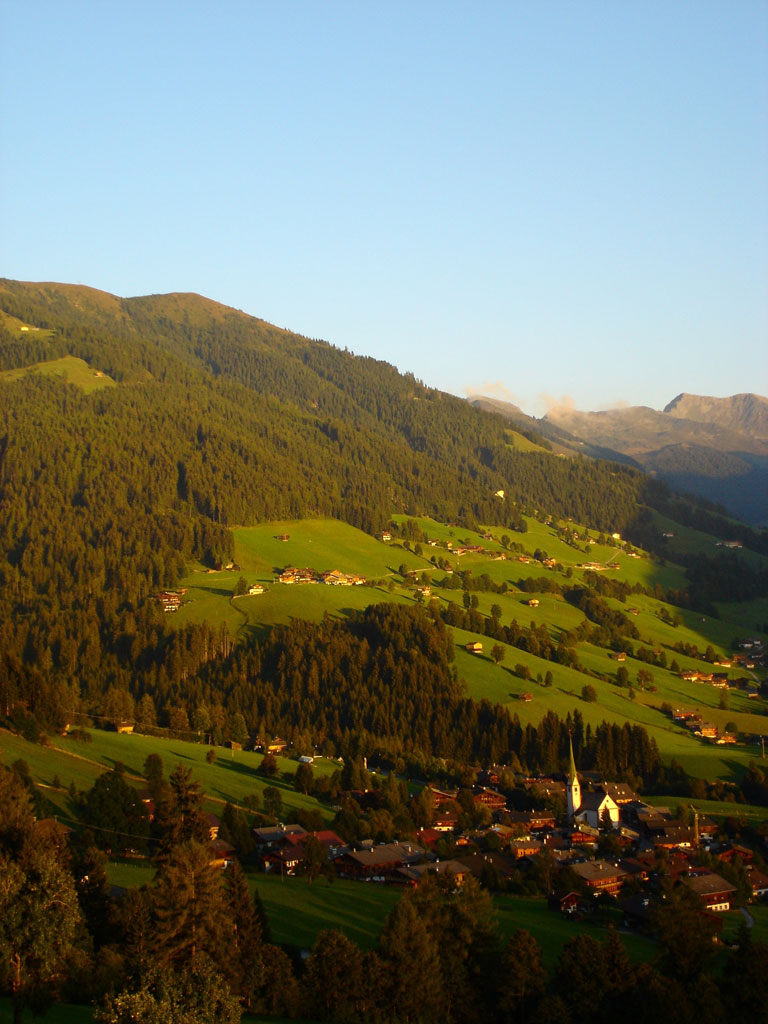 Alpbach im Hochsommer, Blick ins Dorf